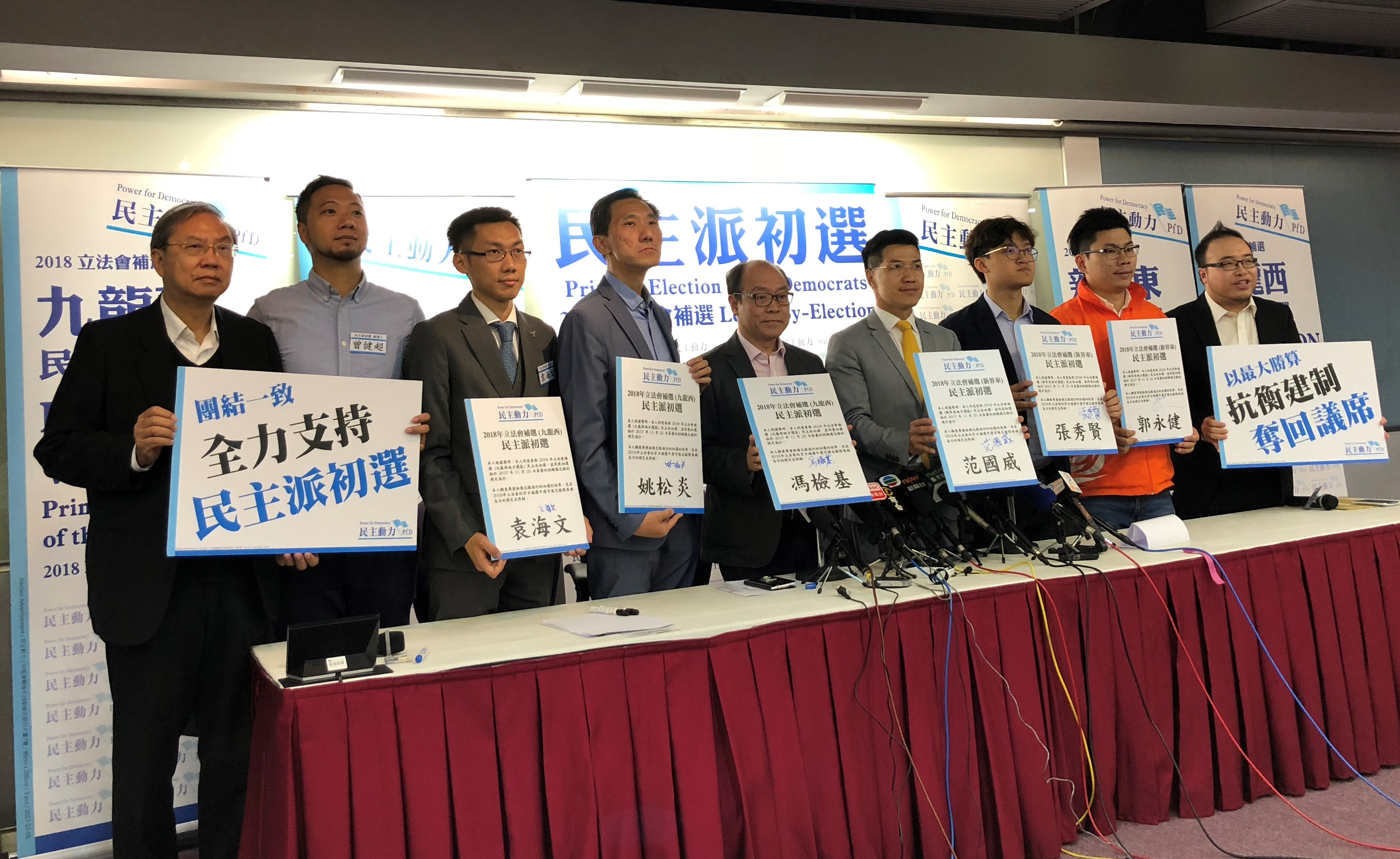 香港民主派宣佈舉行立法會補選初選。（美國之音湯惠芸）